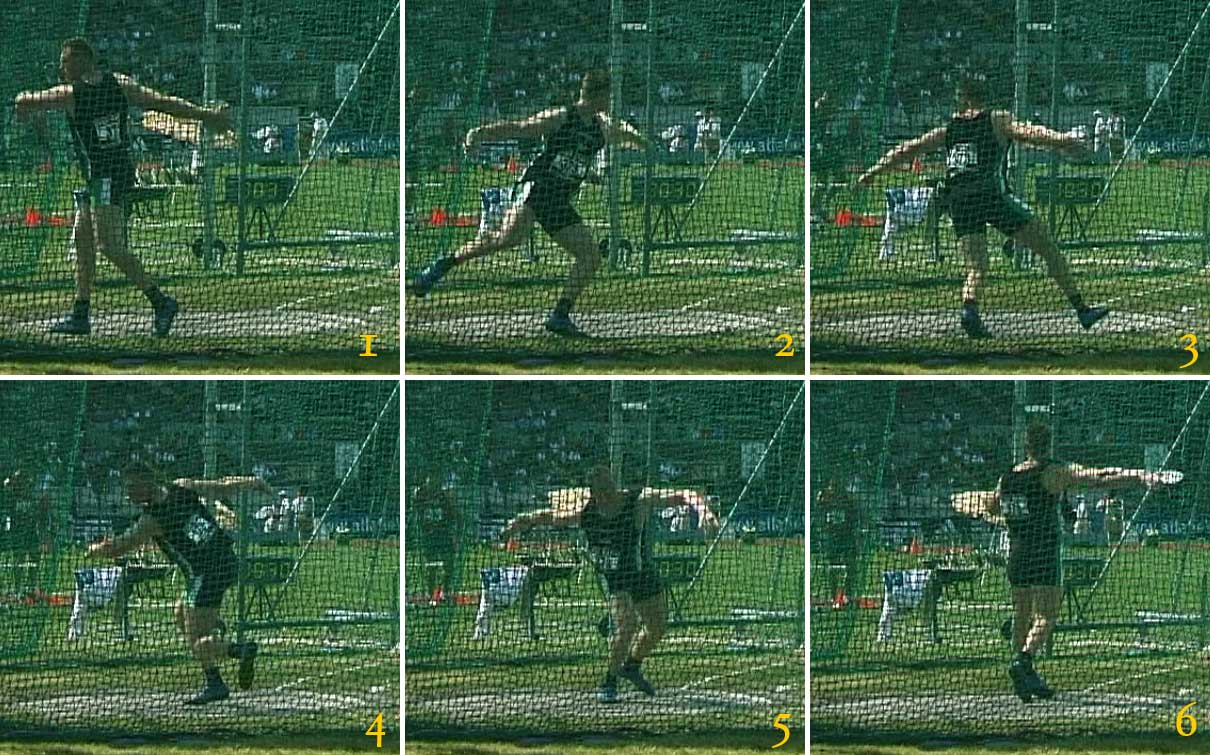 Discus Throw Rutger Smith (nl) 20km